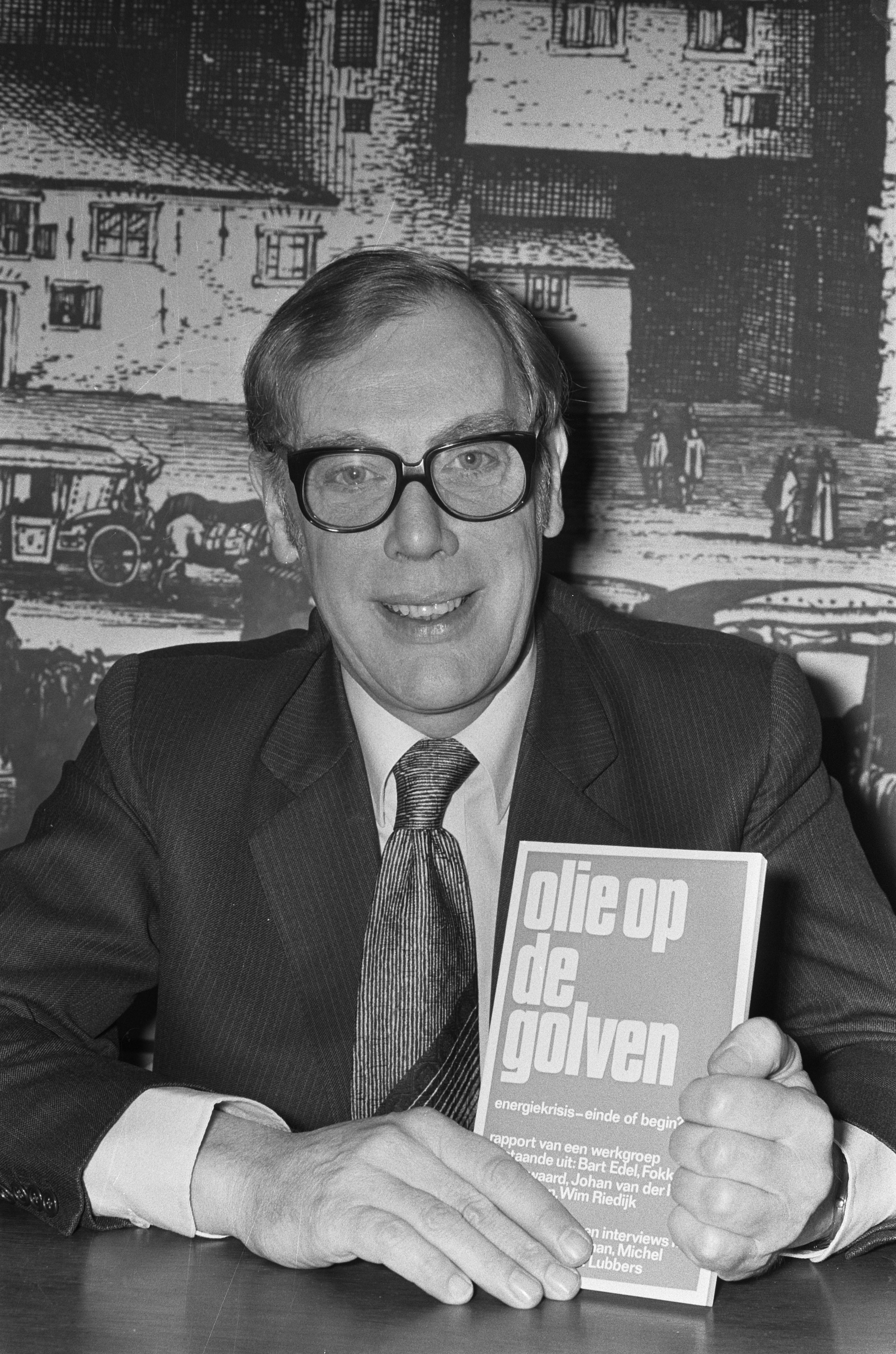 Collectie / Archief : Fotocollectie Anefo Reportage / Serie : Presentatie boekje "Olie op de Golven" van de PPR in Nieuwspoort Beschrijving : Minister Trip met boekje Datum : 27 februari 1974 Locatie : Den Haag, Zuid-Holland Trefwoorden : boeken, ministers, presentaties Persoonsnaam : Trip, F.H.P. Fotograaf : Fotograaf Onbekend / Anefo Auteursrechthebbende : Nationaal Archief Materiaalsoort : Negatief (zwart/wit) Nummer archiefinventaris : bekijk toegang 2.24.01.05 Bestanddeelnummer : 927-0333